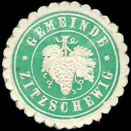 Sealing stamp Title: Gemeinde Zitzschewig Description: Wein, hellgrün, weiß, geprägt Place: Zitzschewig size: 4 cm